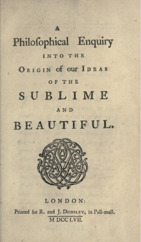 Обложка первого издания